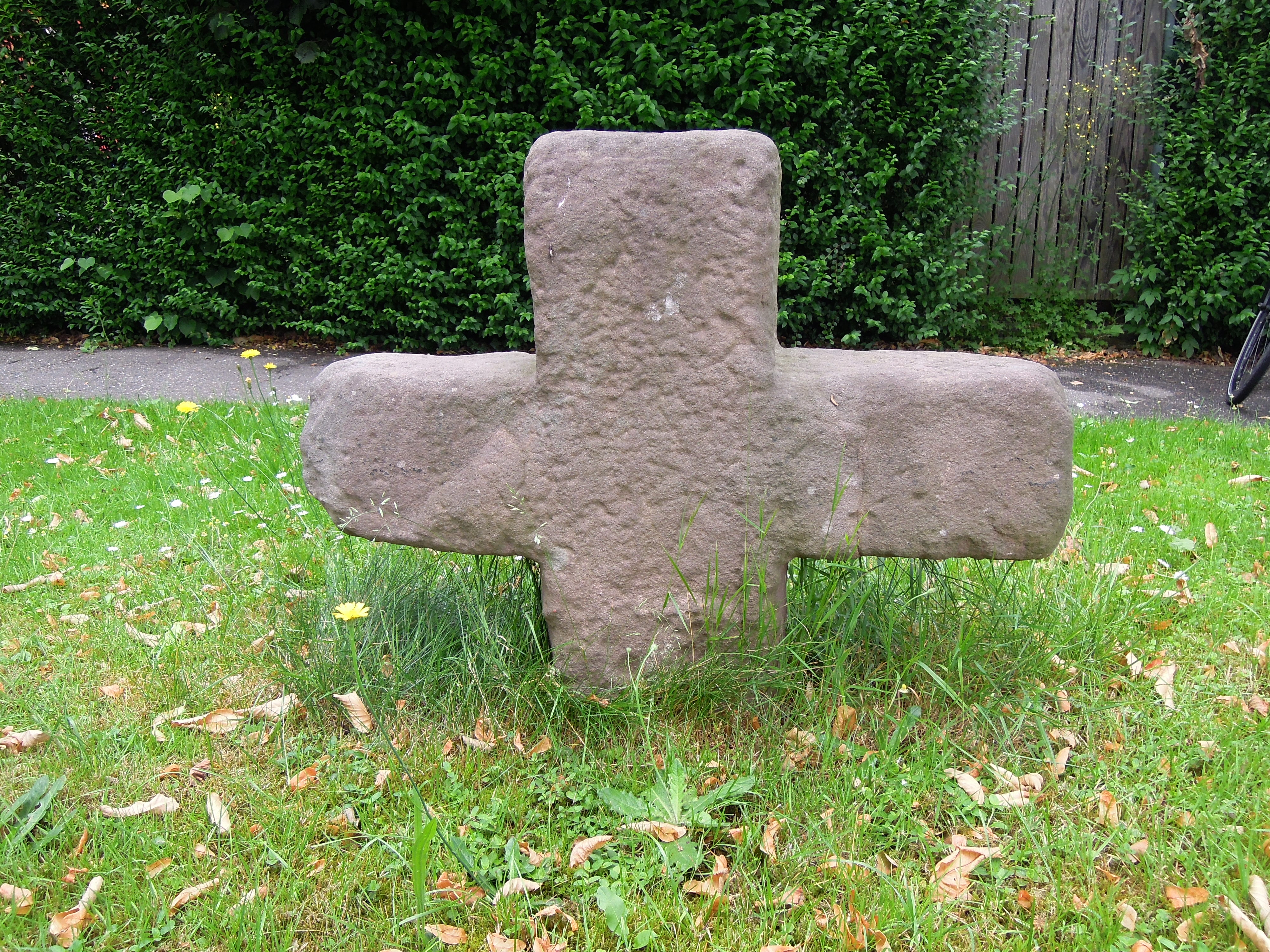 Längsbalkenansicht und Querbalkenlänge betont. Die Armlängen differieren deutlich. Sage: 1. Eine Zigeunerin solle dort verbrannt worden sein. 2. Der Zehnte habe abgegeben werden müssen von jedem, der dort vorbeigekommen sei. (Losch 1981)